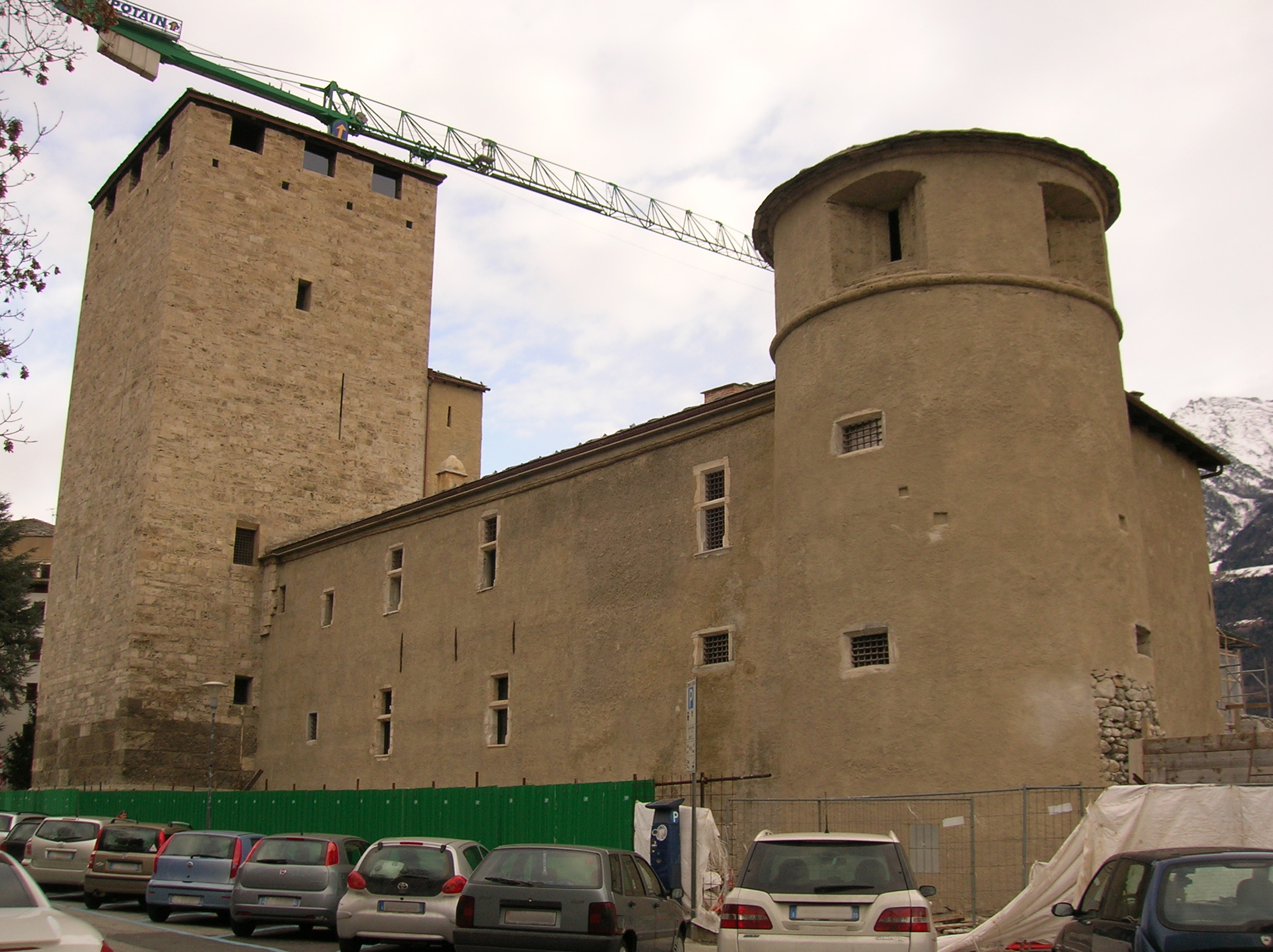 Tour du bailliage - Aoste, Vallée d'Aoste, Italie. C'est fermé fermé pour restauration.